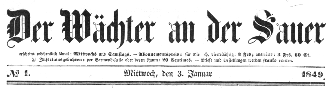 D'Entête vun der éischter Nummer vun der Dikrecher Zeitung Der Wächter an der Sauer vum 3. Januar 1849.